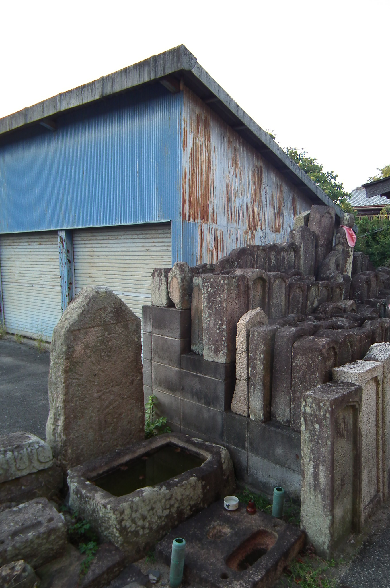 Cemetery of Huchu-cho,Miki,Hyogo 兵庫県三木市芝町墓地